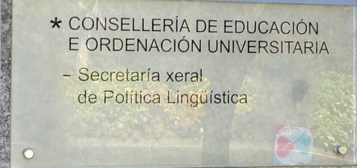 Placa da Secretaría Xeral de Política Lingüística